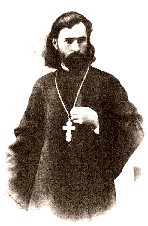 Священник и политический деятель Георгий Аполлонович Гапон (1870-1906)